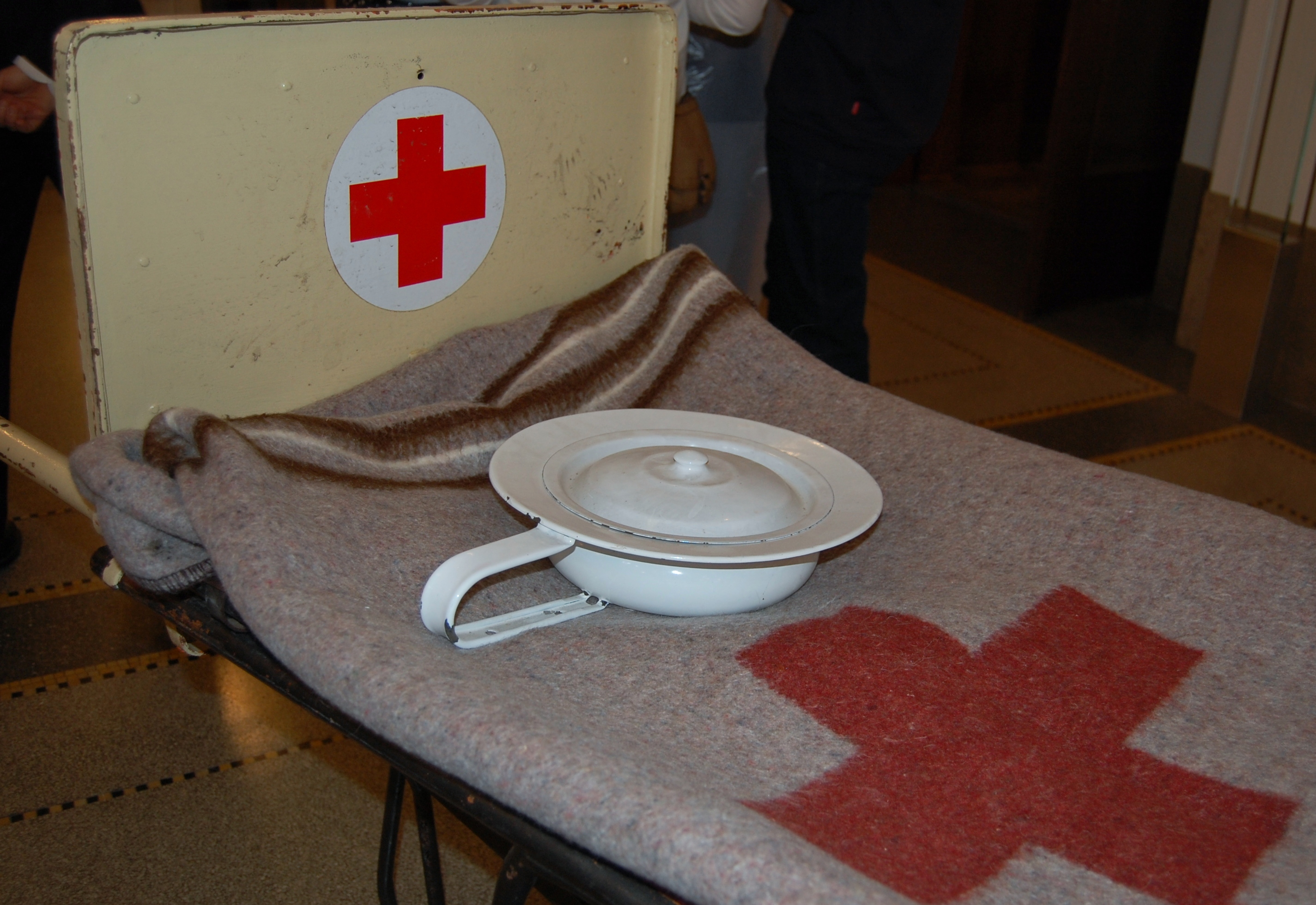 Krankenbett des Deutschen Roten Kreuzes mit Bettpfanne (um 1900?)